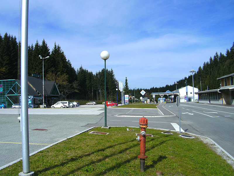 Opuščen mejni prehod Korensko sedlo je bil preurejen, v ozadju še vedno stoji avstrijska nadstrešnica.